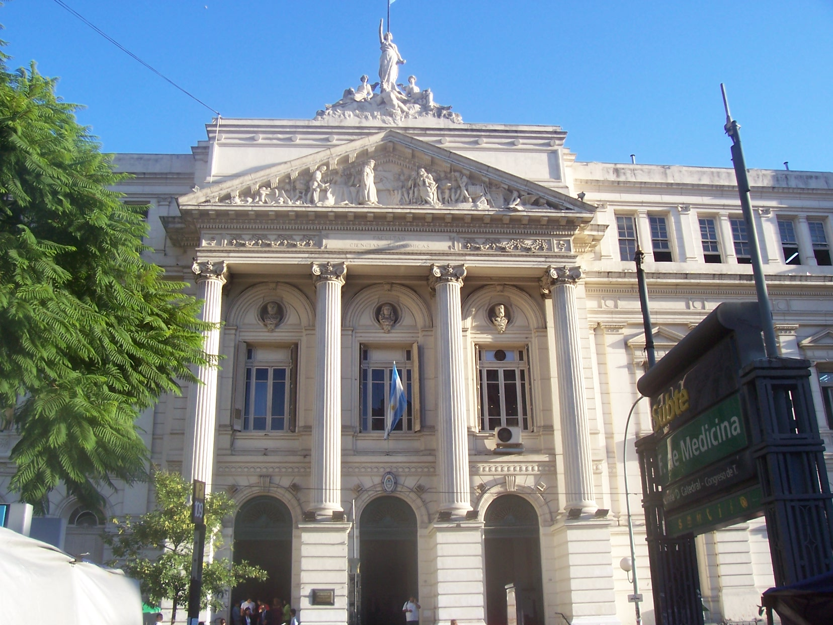 La facultad de Ciencias Económicas de la Universidad de Buenos Aires